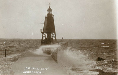 Der Ostmohlenkopf in Swinemünde